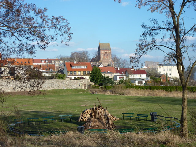 Lychen, Brandenburg., 24 km from Neustrelitz, Deutschland (Zone 33). Blick auf die Stadtmauer und Kirche in Lychen.